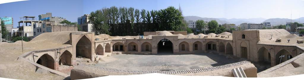 کاروان سرای عباسی کرج - عکس از بابک قيلزده - 5/1383 - برای استفاده عمومی --Babakgh ۱۱:۰۹, ۱۶ اوت ۲۰۰۵ (UTC)